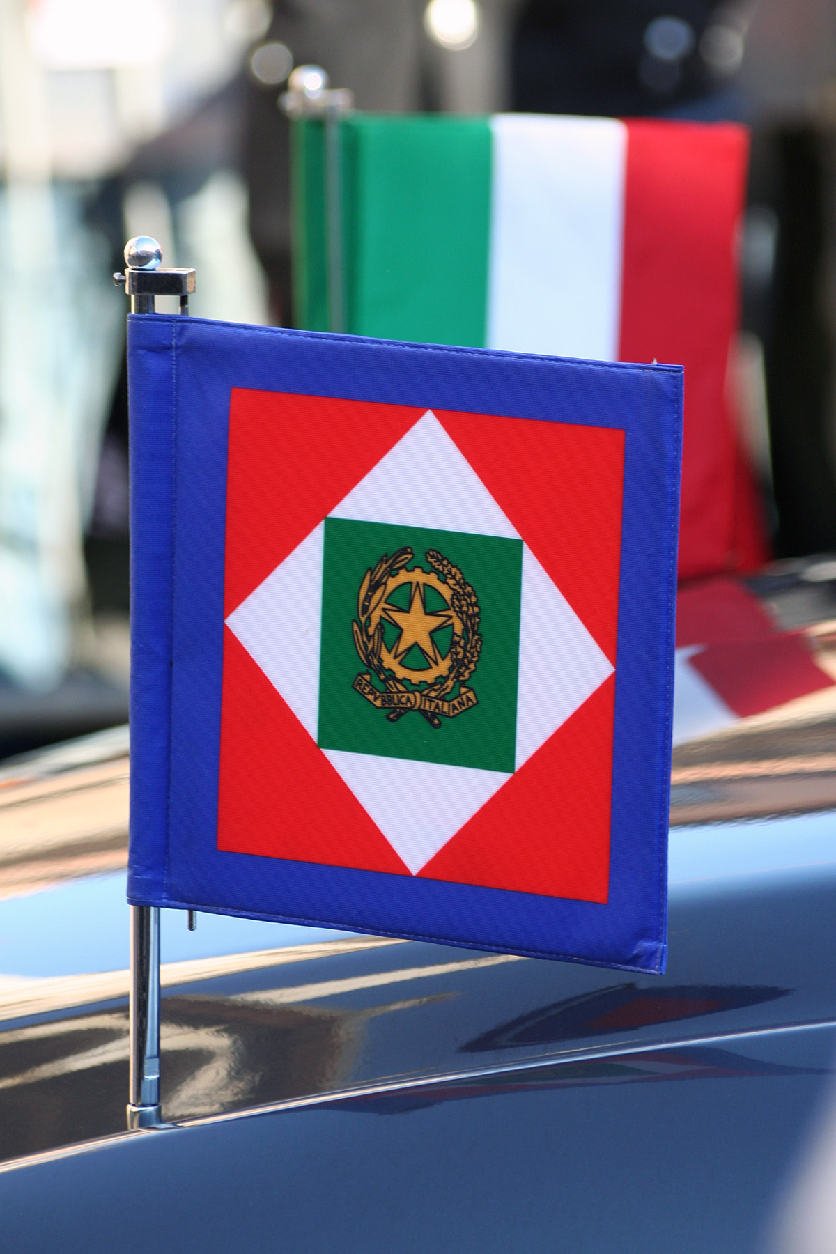 Modena - La morte di Pavarotti